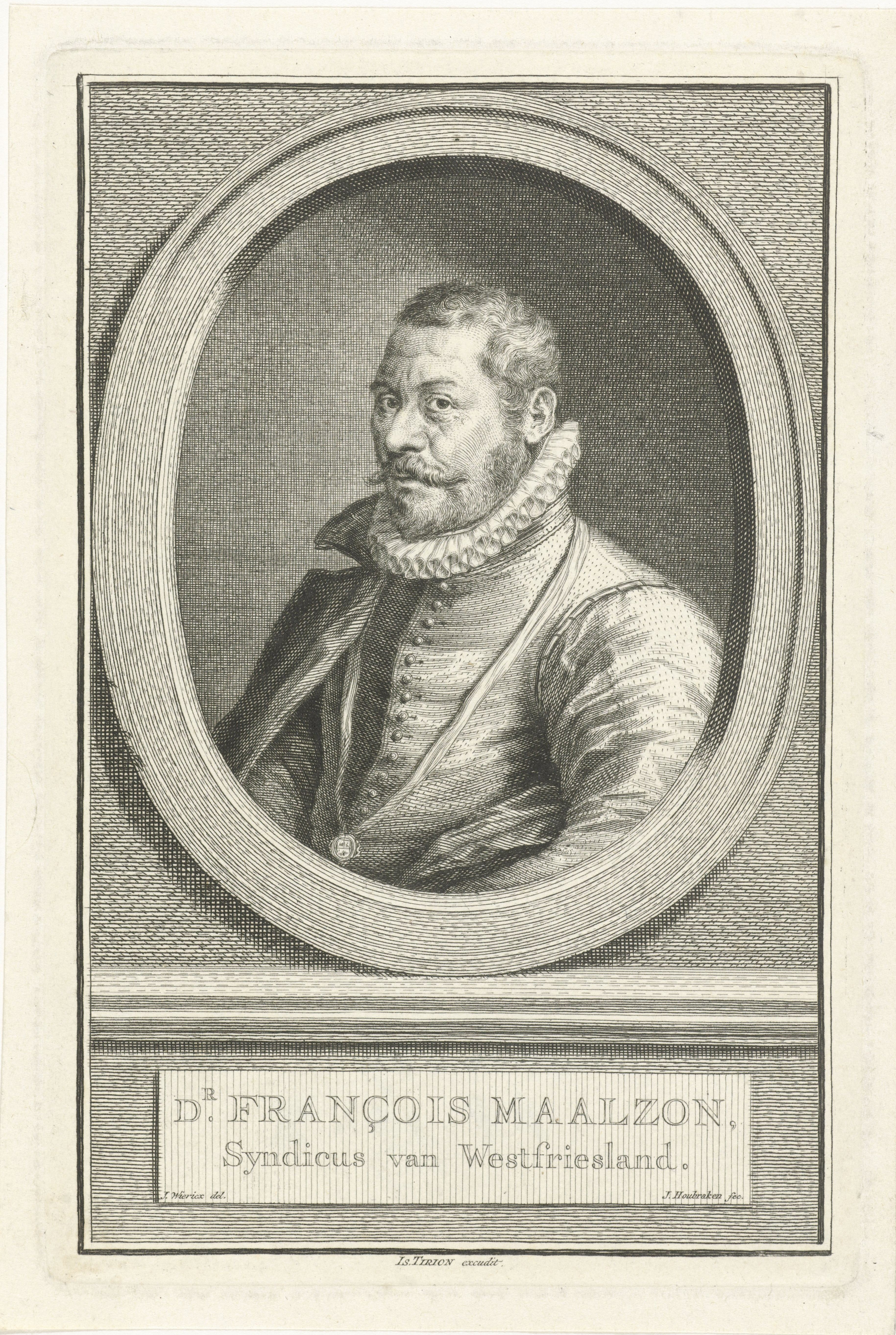 IdentificatieTitel(s): Portret van François MaelsonDr. François Maalzon (titel op object)Objecttype: prent Objectnummer: RP-P-1894-A-18509Catalogusreferentie: Ver Huell 281-2(2)Opmerking: 3(3), 3 staten in de collectie van het RijksmuseumFMP 3365-cOpschriften / Merken: verzamelaarsmerk, verso, gestempeld: Lugt 2228Omschrijving: Portret naar links van François Maelson in een ovaal. Het portret rust op een plint Waar: op zijn naam en titel in twee regels in het Nederlands.VervaardigingVervaardiger: prentmaker: Jacob Houbraken (vermeld op object)naar tekening van: Johannes Wie: rix (vermeld op object)uitgever: Isaak Tirion (vermeld op object)Plaats vervaardiging: AmsterdamDatering: 1749 - 1759Fysieke kenmerken: gravureMateriaal: papier Techniek: graveren (drukprocedé)Afmetingen: plaatrand: h 177 mm × b 117 mmOnderwerpWieFrançois MaelsonVerwerving en rechtenVerwerving: aankoop apr-1894Copyright: Publiek domein